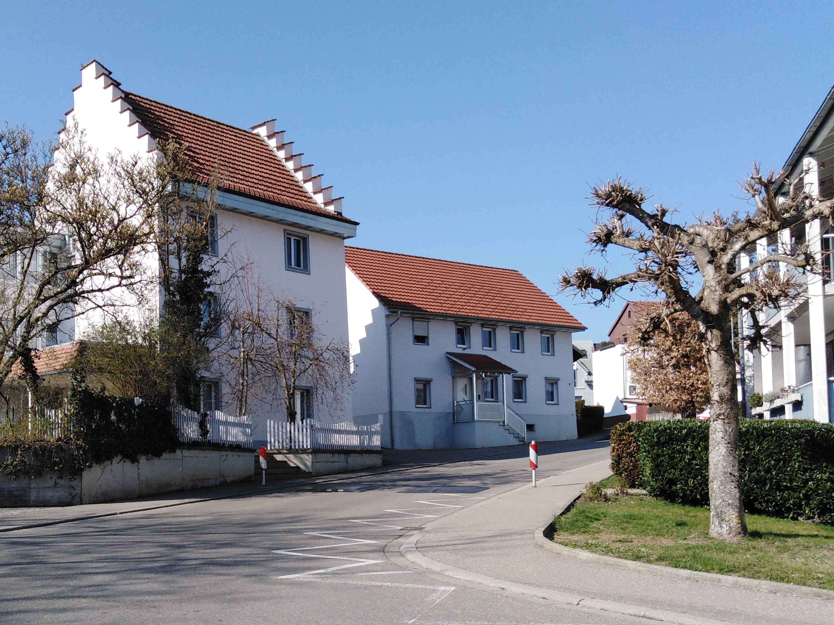 Lauchringen, Gemeinde im Landkreis Waldshut in Baden Württemberg. Historisches Vogtshaus (15. Jhdt)in Unterlauchringen.